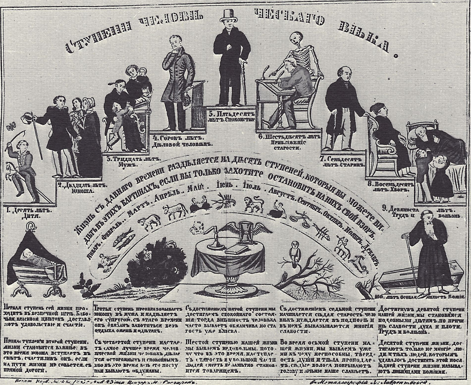 «Ступени человеческого века», библиотека Салтыкова-Щедрина, Санкт-Петербург. Steps of life (Ages of man), from Lubok; colorized etching; Saltykoff-Shtshedrin Library, St. Petersburg